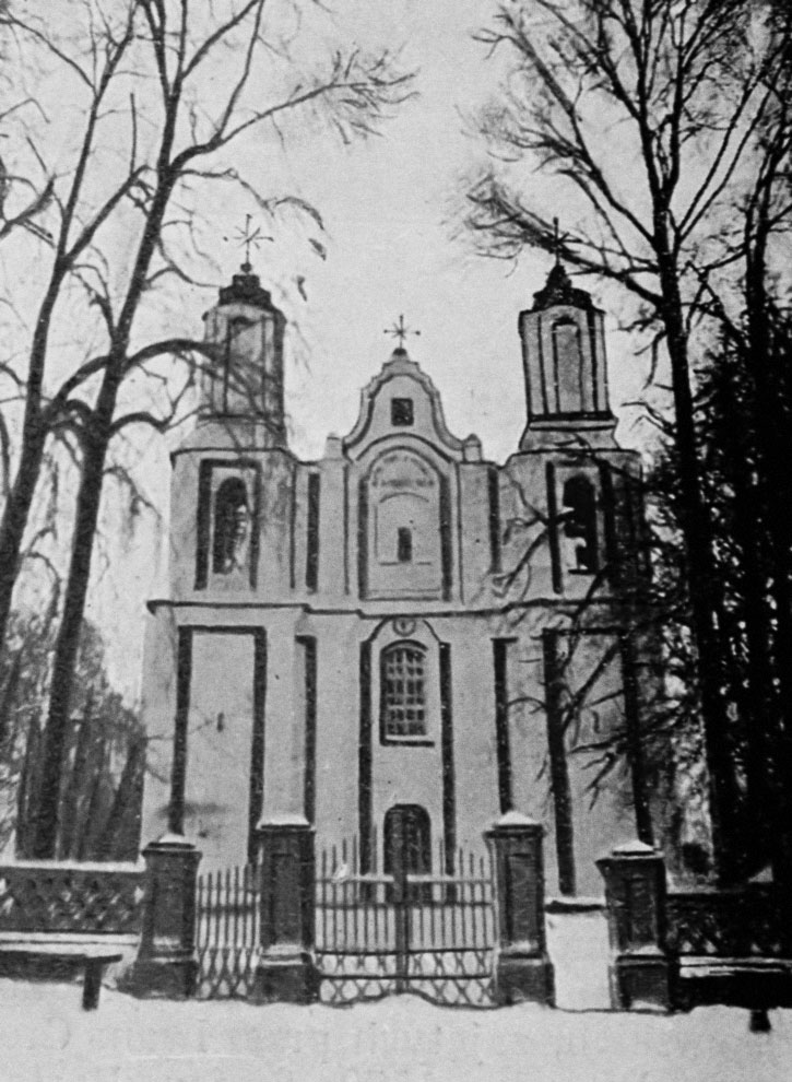 Беларуская (тарашкевіца): Губін (Hubin). Касьцёл